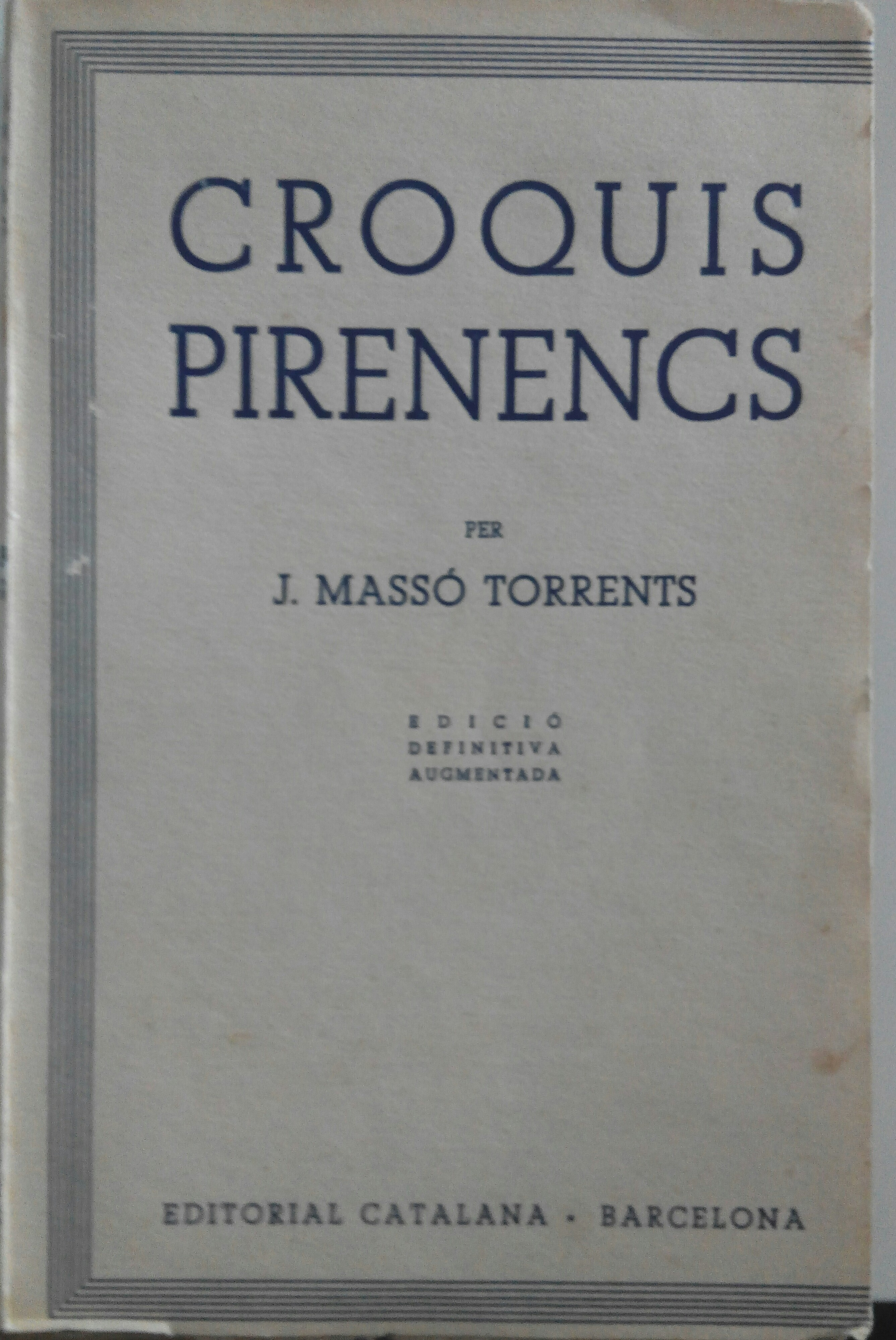 Croquis Pirenencs, de Jaume Massó Torrents, edició de 1921